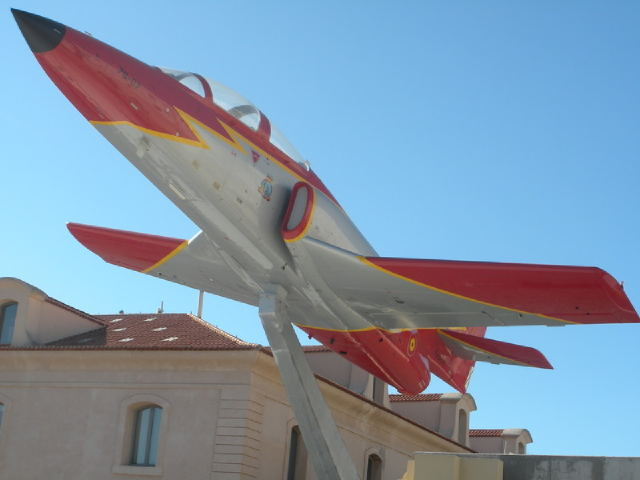 C-101 Aviocar de la Patrulla Águila cedido a la Universidad Politécnica de Cartagena. Numeral E.25-07